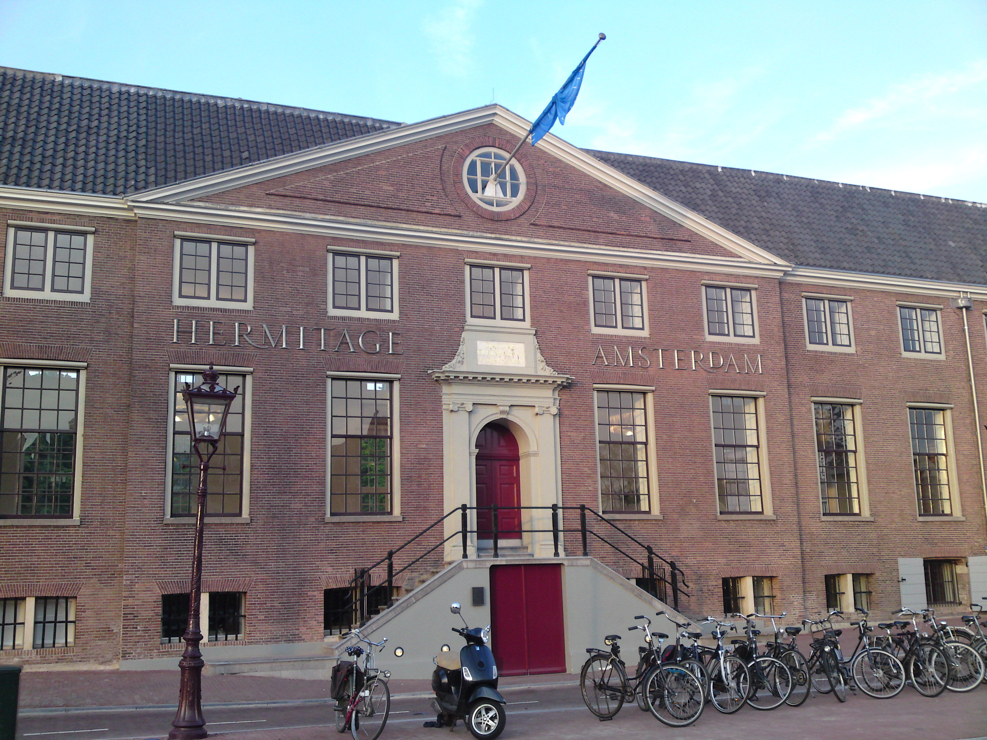 Ingang van de Hermitage Amsterdam